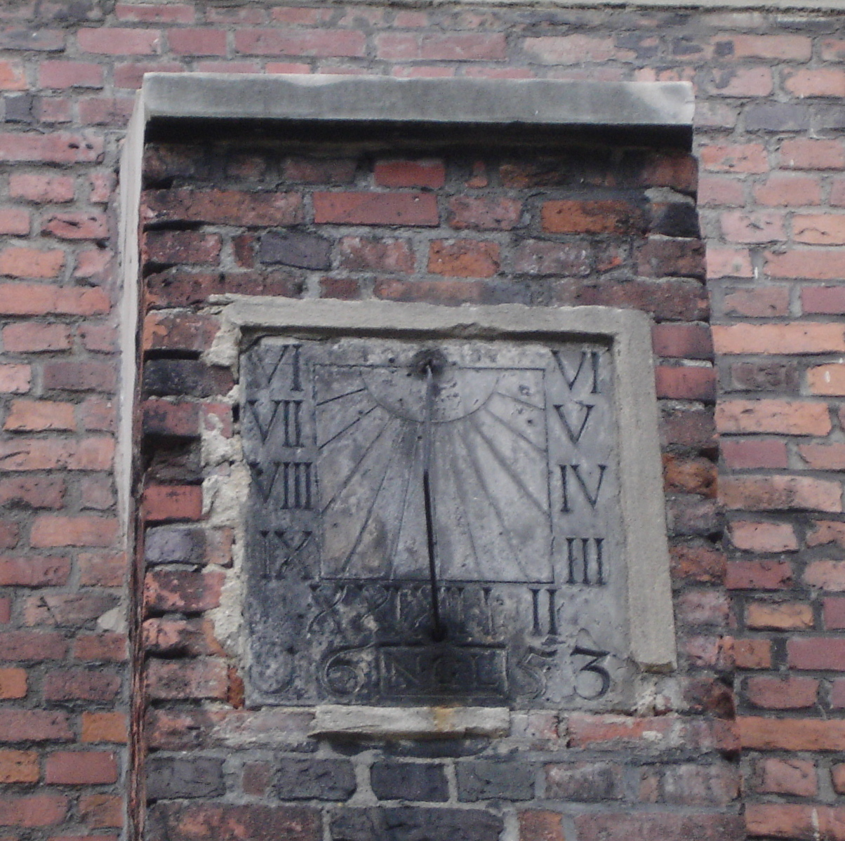 Zegar słoneczny na południowej przyporze kościoła pod wezwaniem świetego Jana Chrzciciela w Lesznie